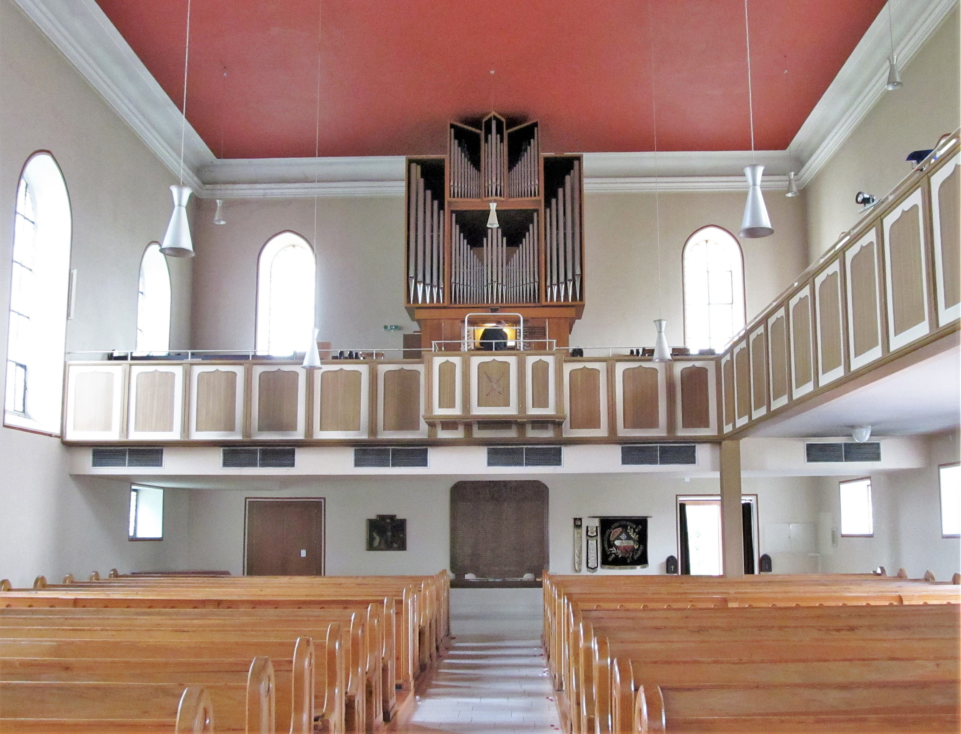 Blick ins Innere der protestantischen Martin-Luther-Kirche in St. Ingbert, Saarland